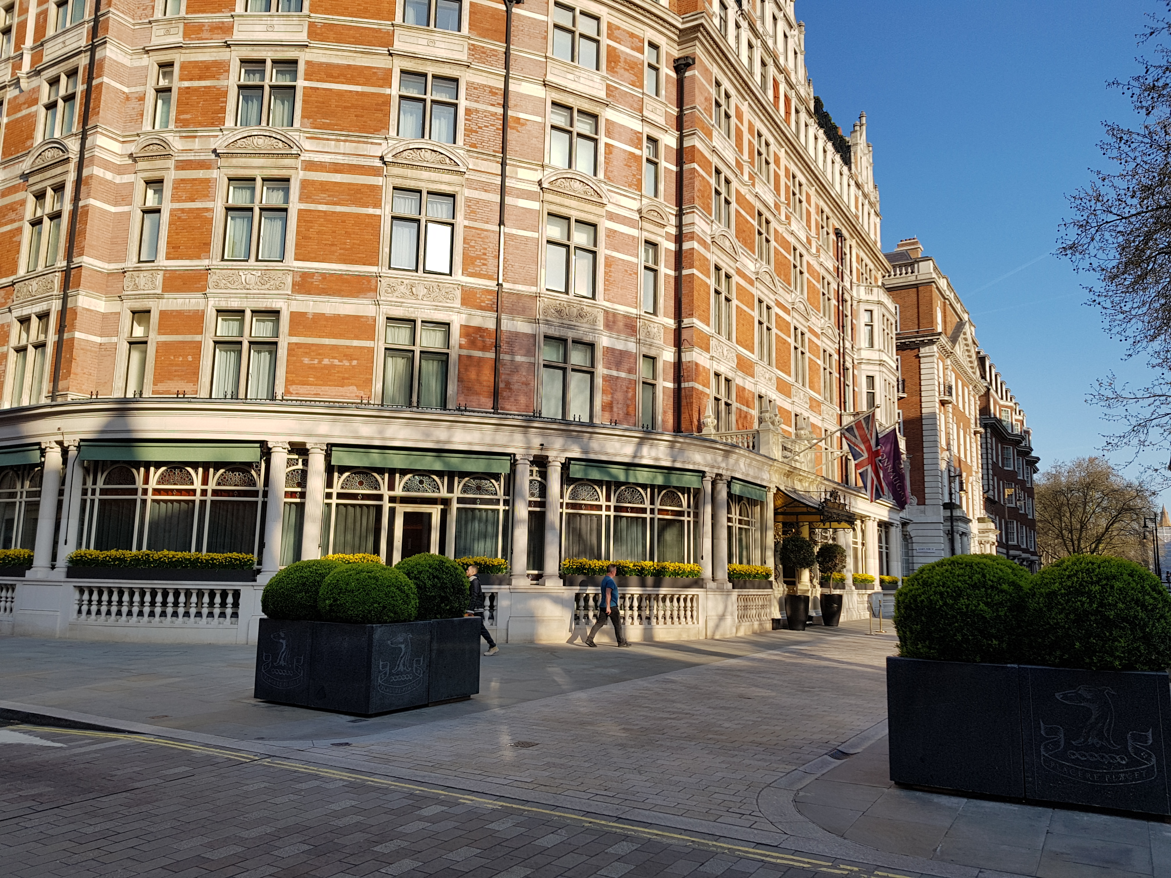 Le palace The Connaught, Londres, vu de Mount Street.